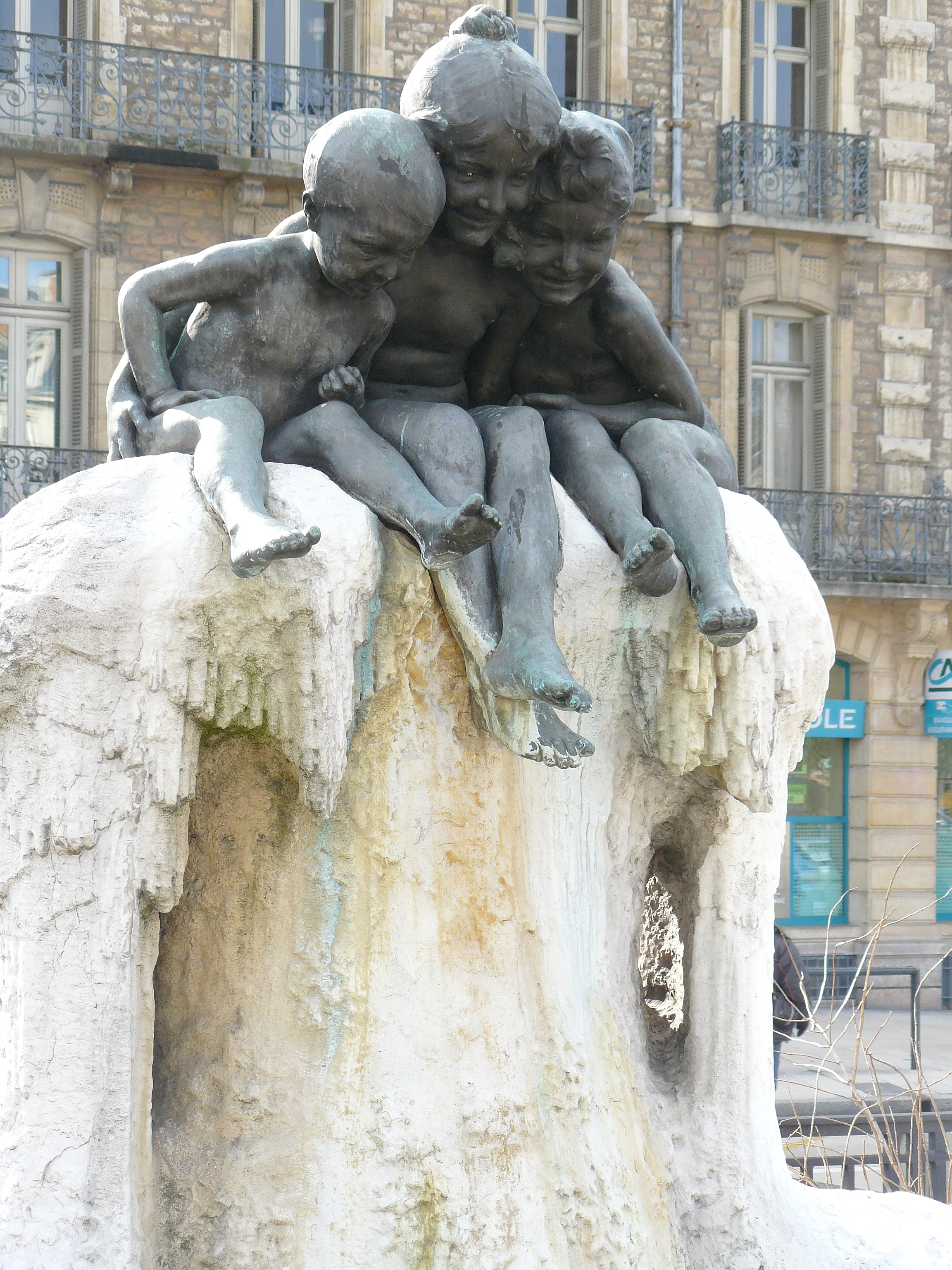 Fontaine de Jeunesse ou Fontaine aux Grenouilles (détail), de Max Blondat (1872-1925), sur la place Darcy à Dijon (Côte-d'Or, France).